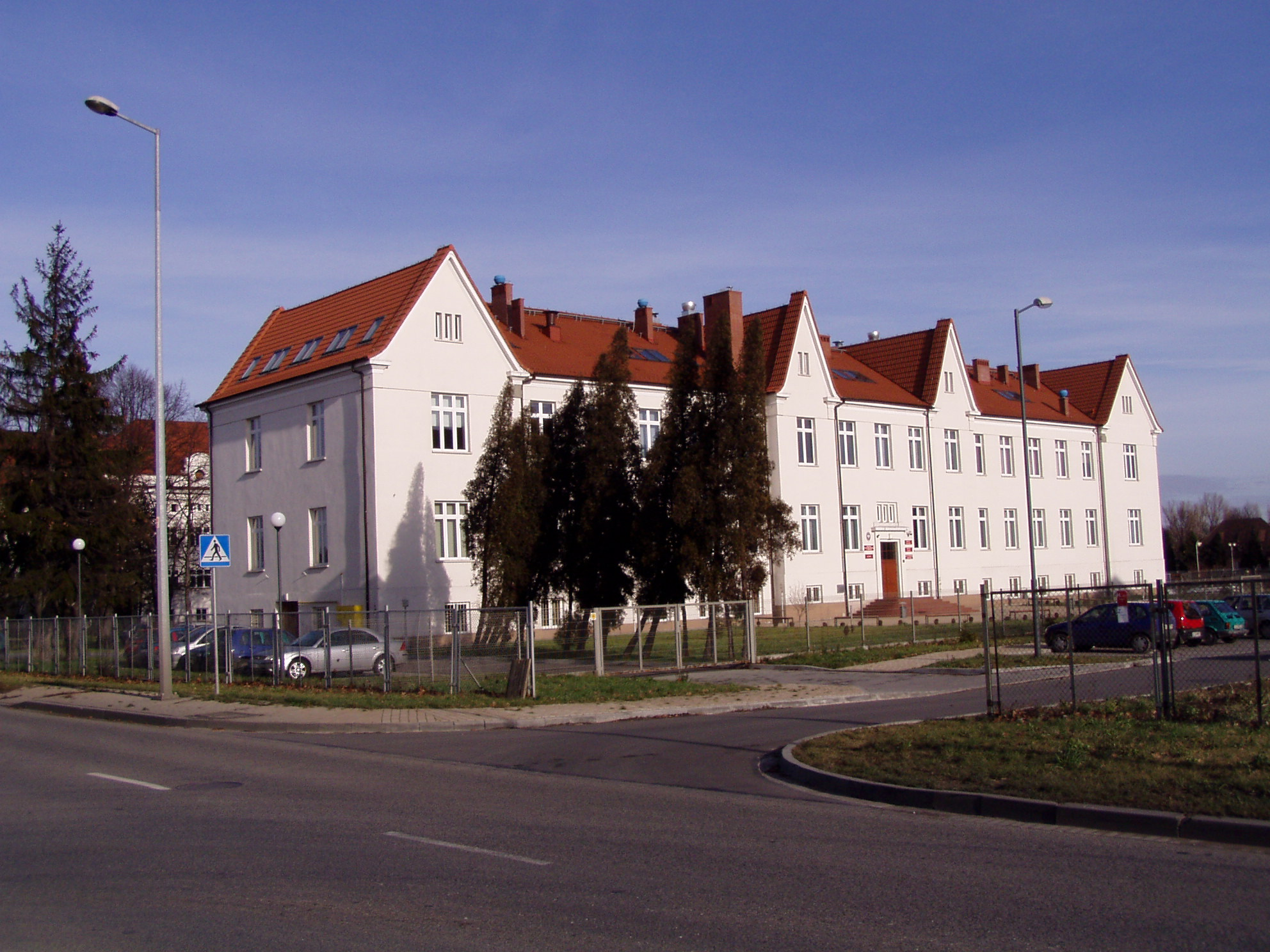 Buildingo of former Polski Monopol Tytoniowy